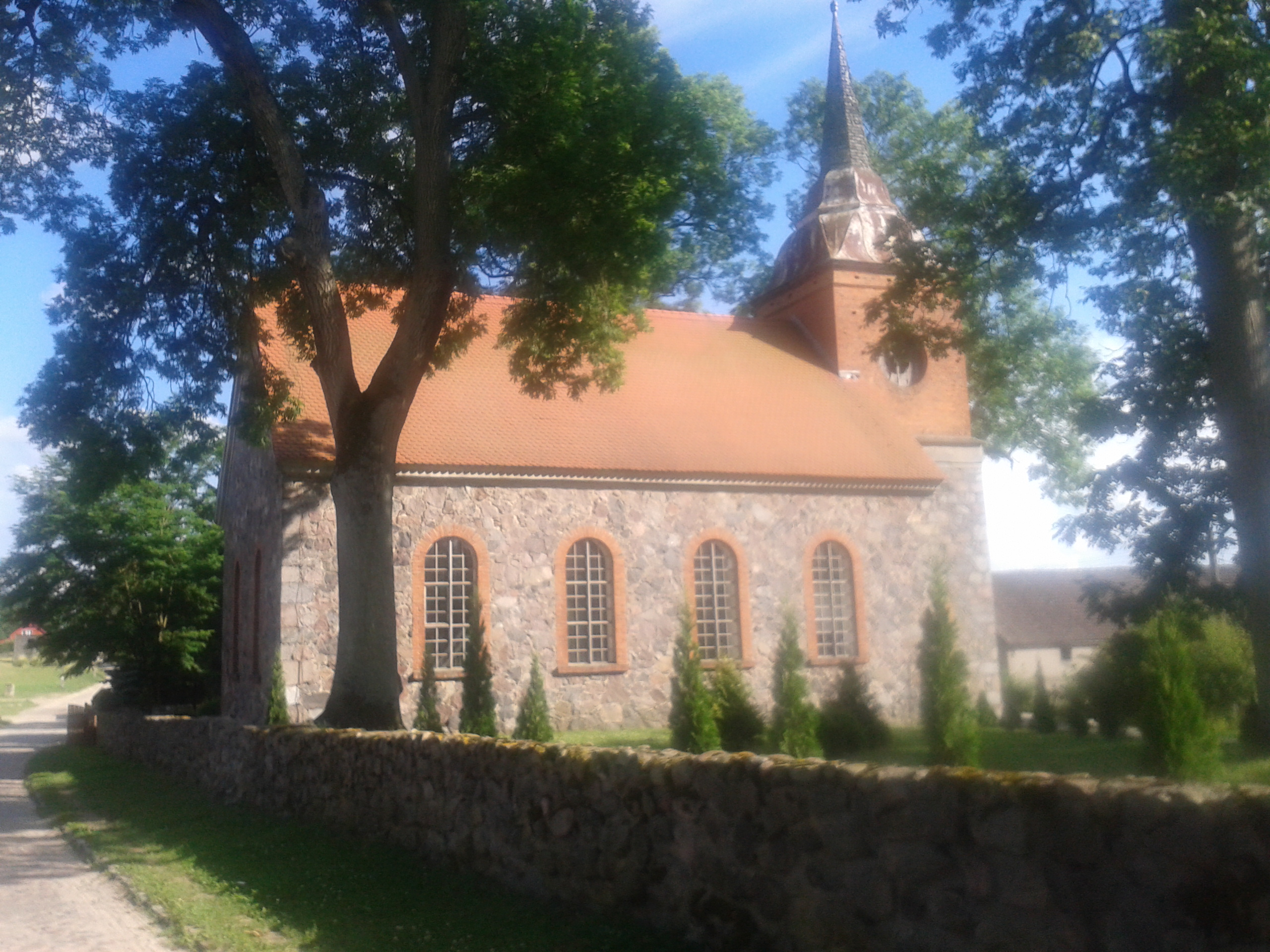 Bonin - dawny kościół ewangelicki, ob. rzymskokatolicki p.w. św. Józefa, 1845